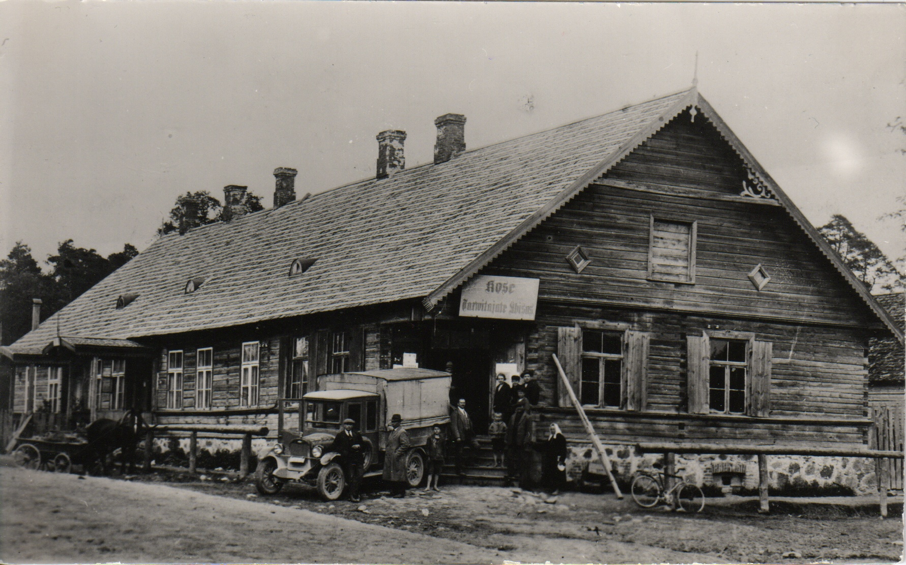 Kose vana apteegihoone aadressil Kehra mnt. 6. Ravilast kohale toodud ja apteegiks kohandatud maja oli pildistamise hetkel kasutuses Kose Tarbijate Ühisuse (kiri sildil: Kose Tarwitajate Ühisus) poena. Hiljem kolis apteek antud hoonesse tagasi ja oli seal kuni 2002. aastani, mil leiti sobivamad ruumid Pikal tänaval.